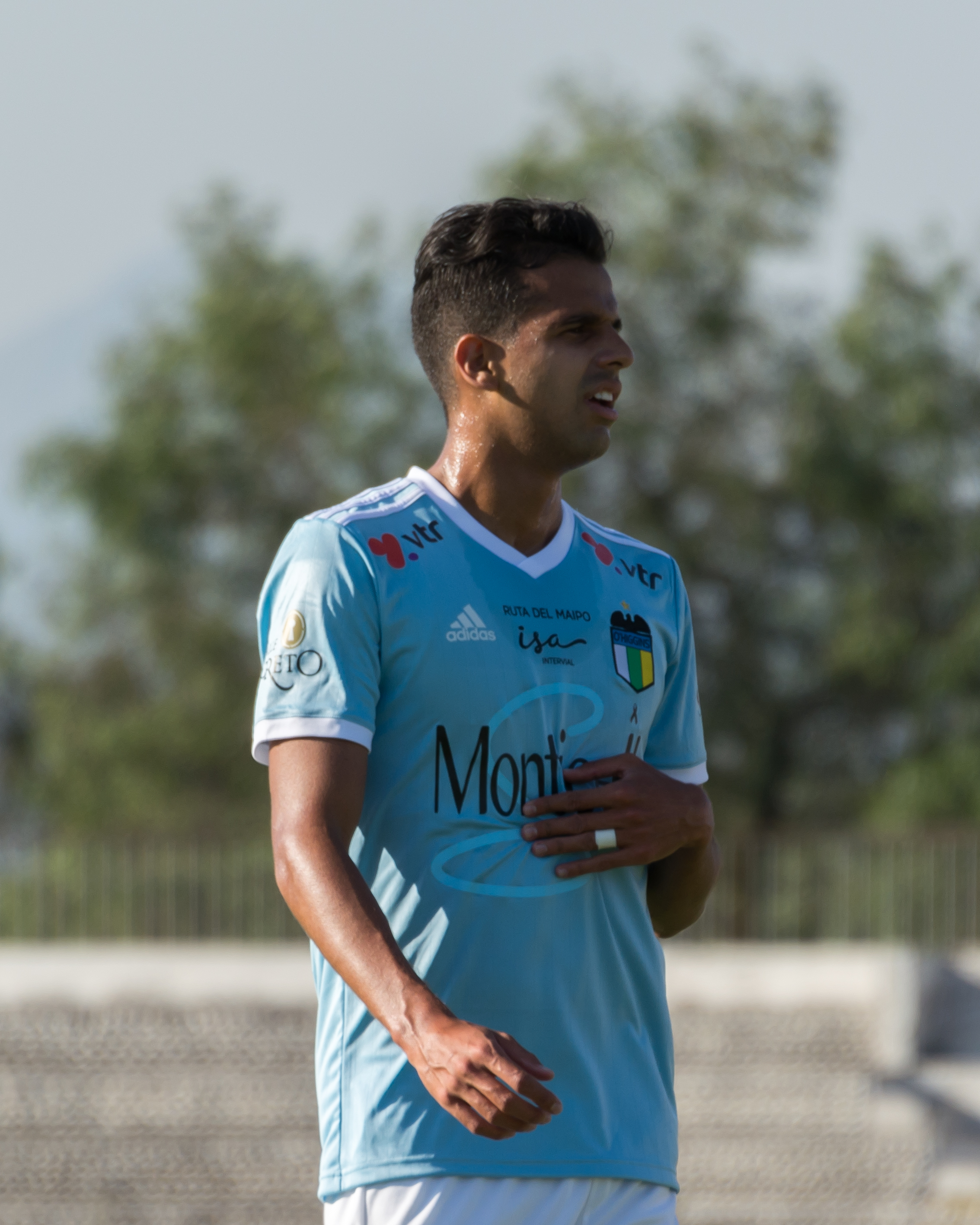 Fabrizio Ramírez, Palestino v O'Higgins, Estadio Municipal de La Cisterna, La Cisterna, Santiago, Chile.